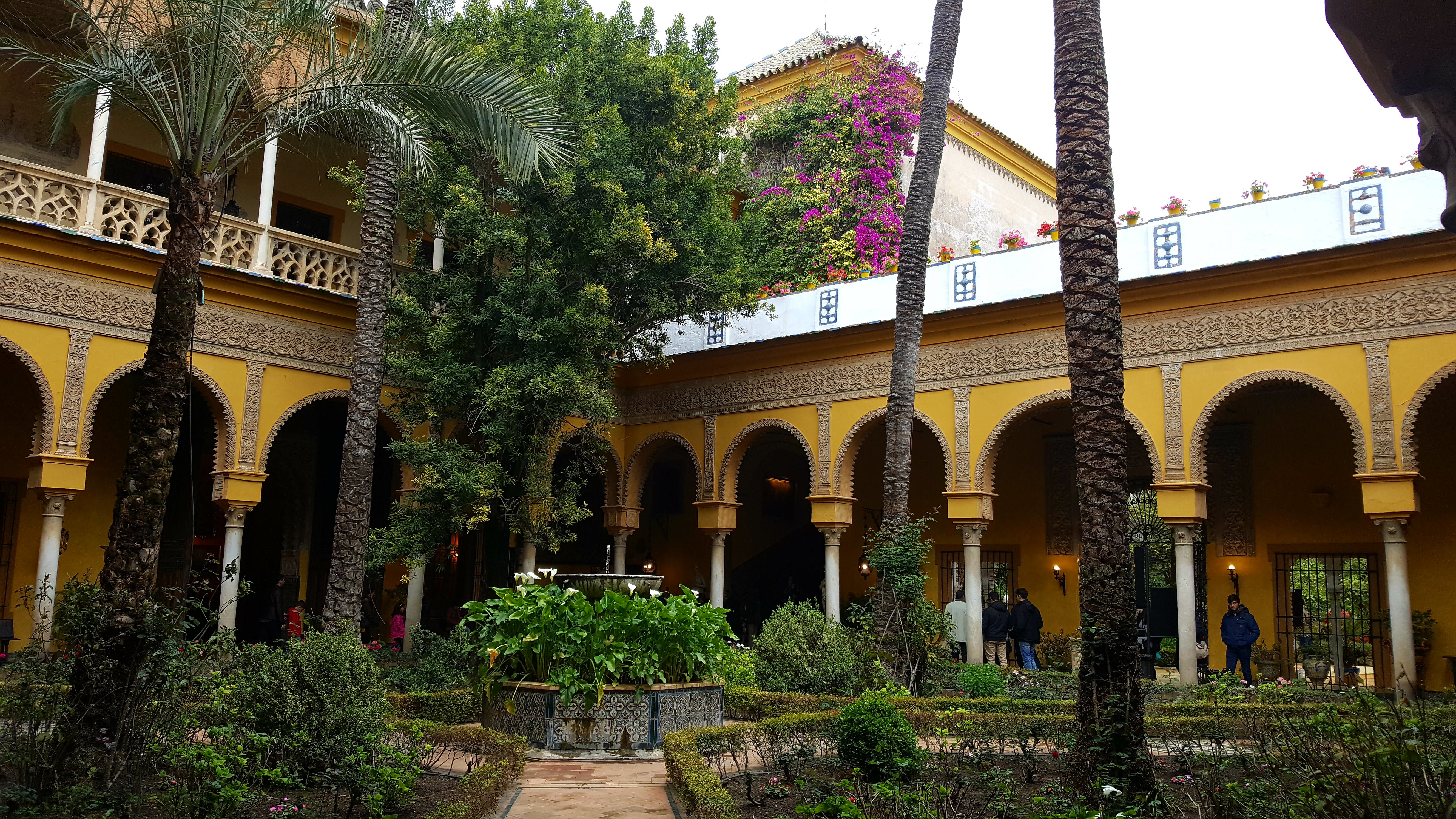 Patio Principal del Palacio de las Dueñas, Sevilla.